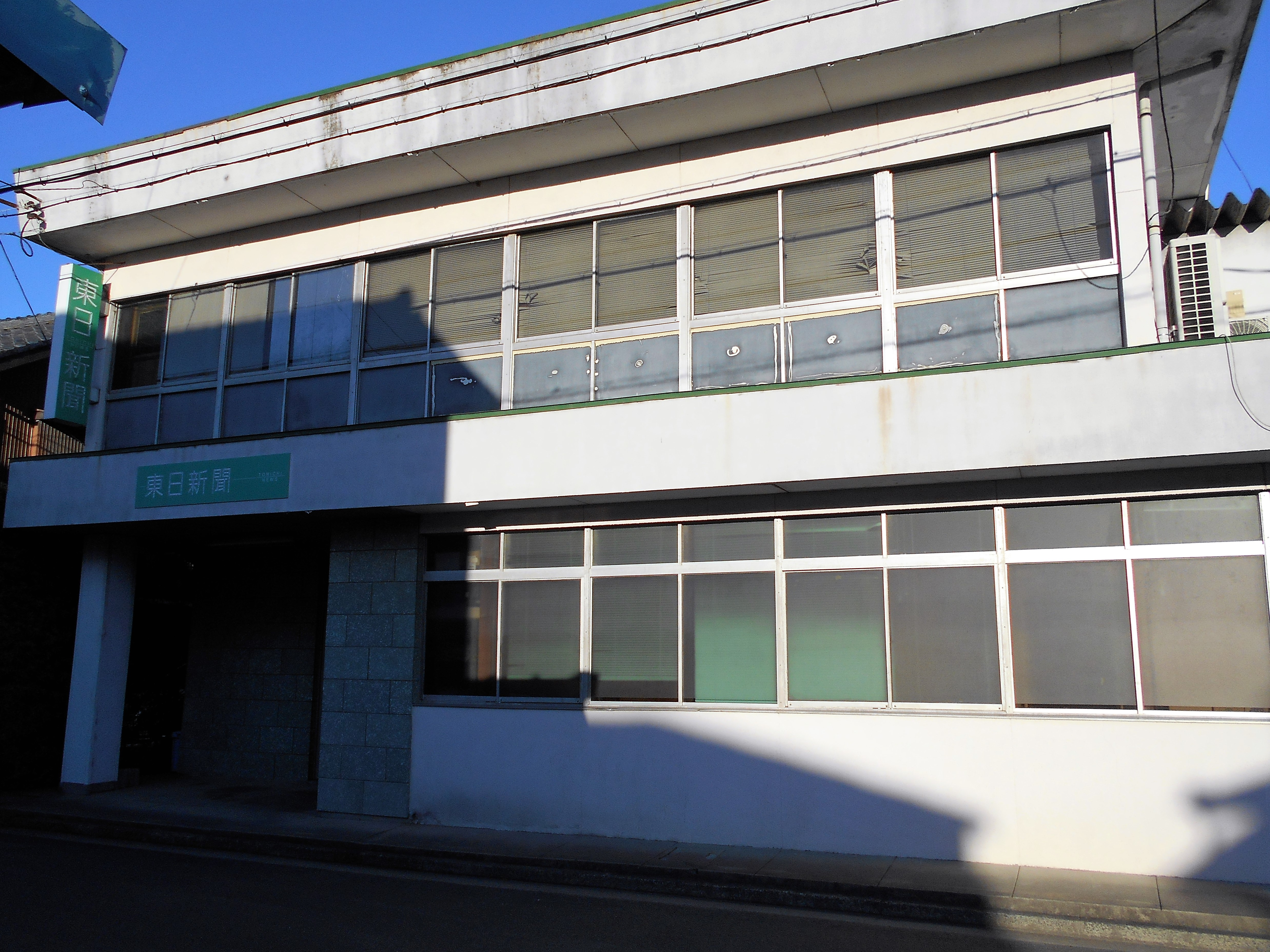 東海日日新聞社（愛知県豊橋市）